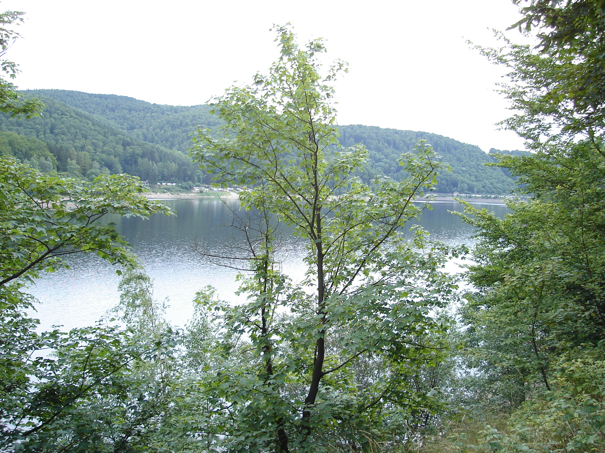 Odertalsperre im Harz